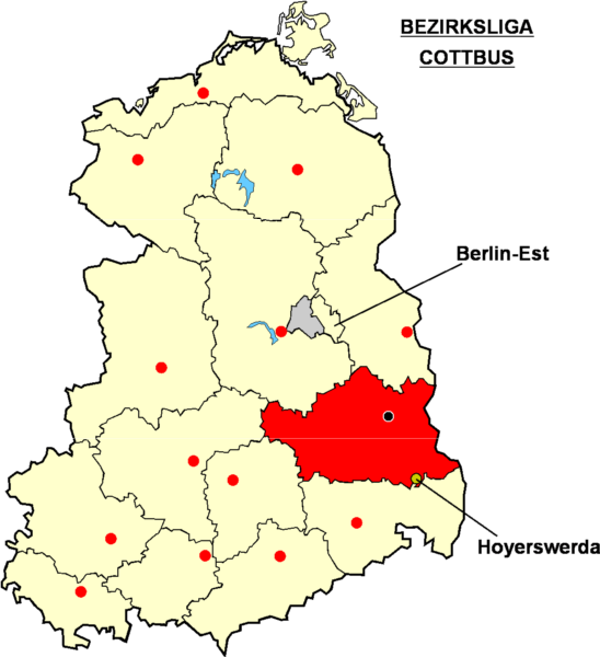 Localisation d'Hoyerswerda dans la "Bezirksliga Cottbus" à l'époque de la RDA Catégorie:Logo de clubs de football - Allemagne